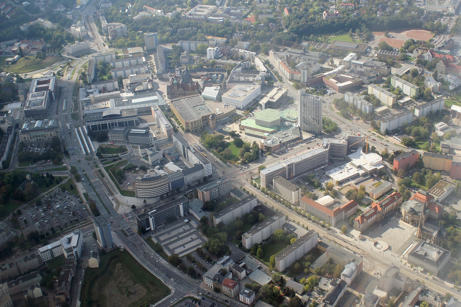 Das Chemnitzer Stadtzentrum aus der Vogelperspektive, 2014